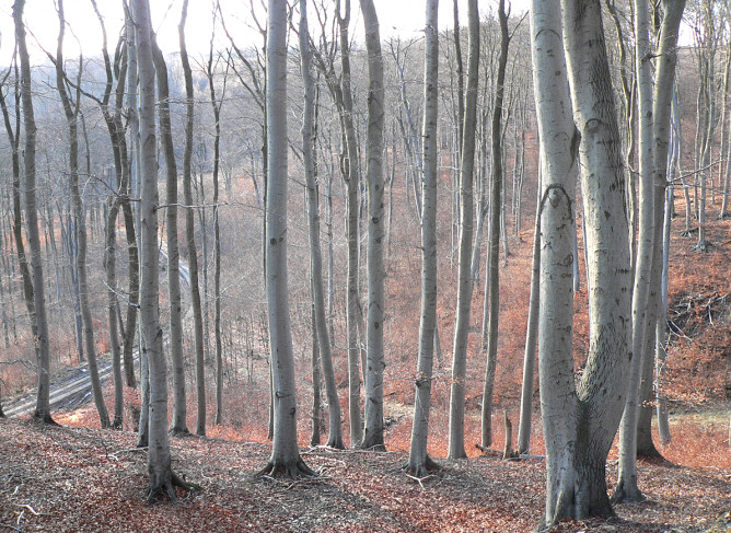 Buchenhochwald im Elm